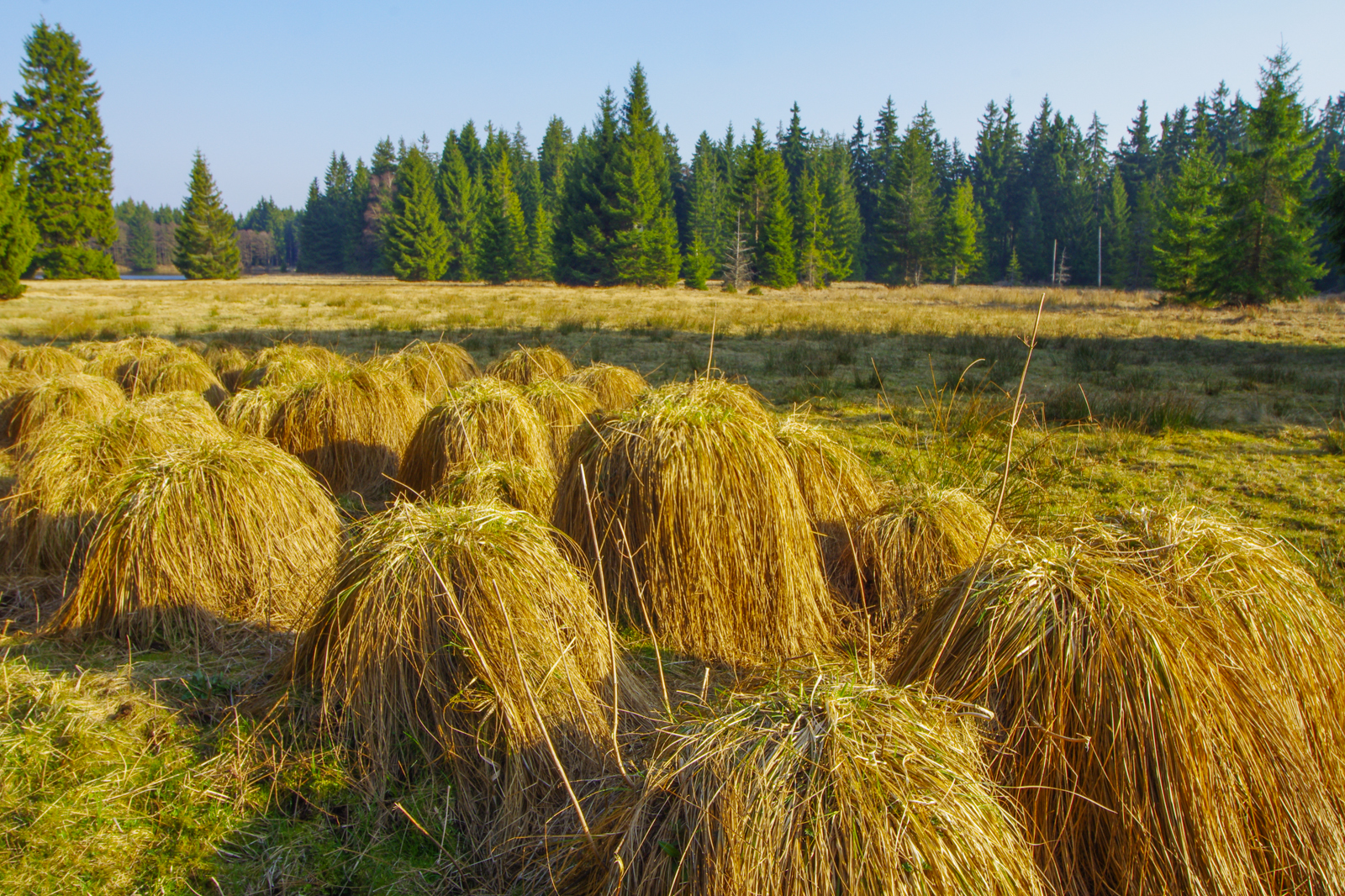 Národní přírodní rezervace Kladské rašeliny, lokalita Paterák, jihovýchodní okraj lokality, okres Cheb